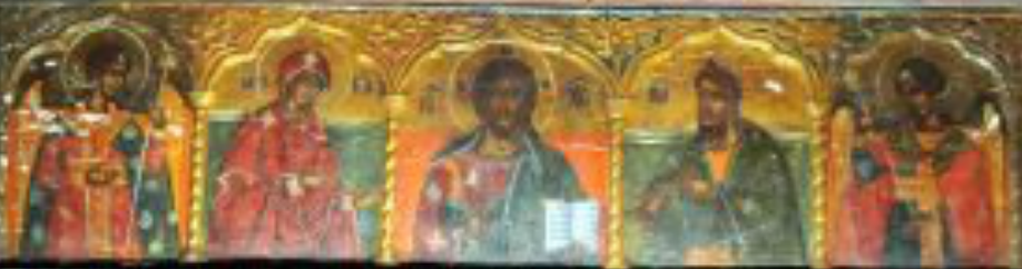 Фреска во манастирската црква Св. Никола во прилепско Слепче